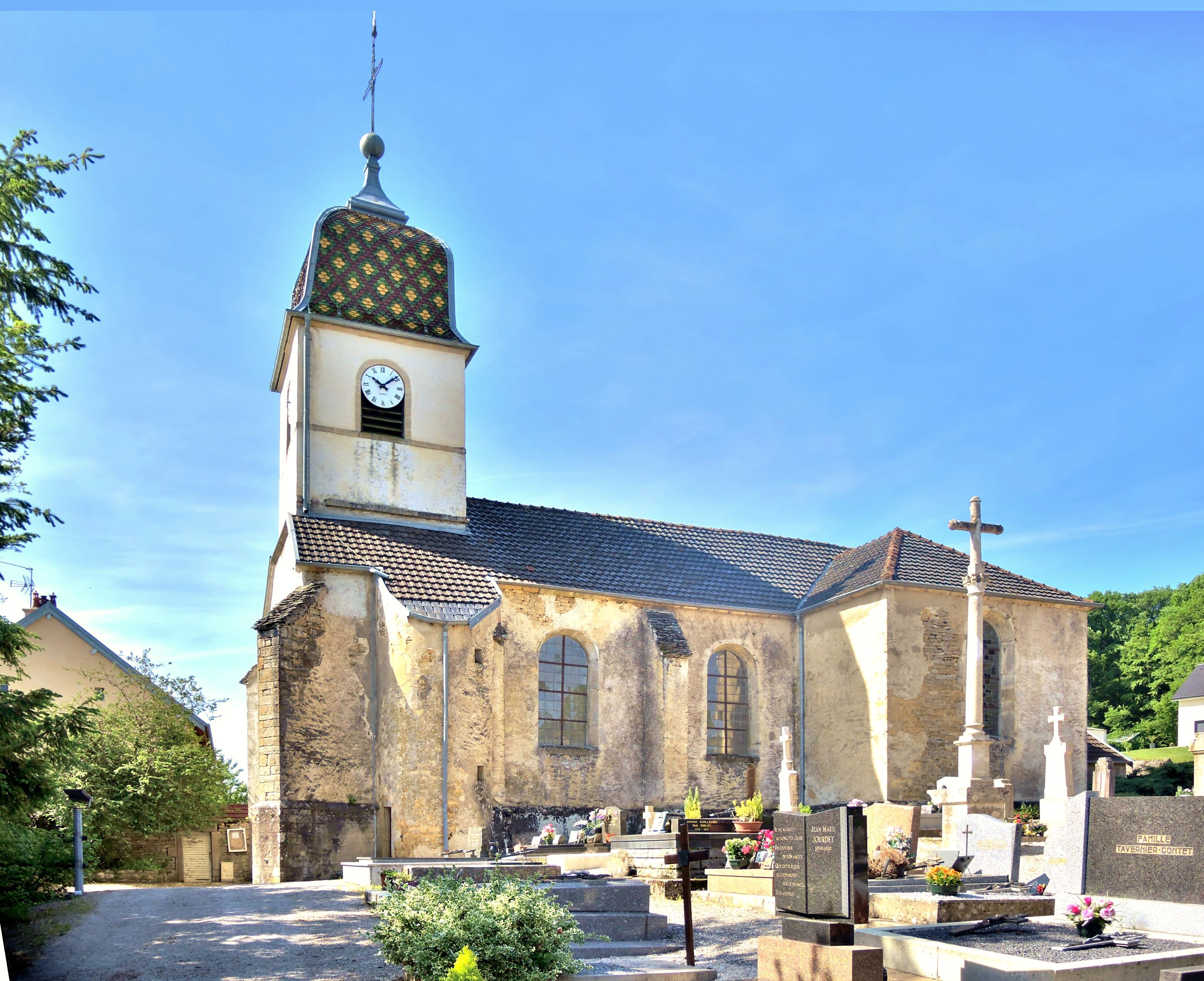 Eglise Saint-Jean-l'Evangéliste d'Andelarre. Haute-Saône